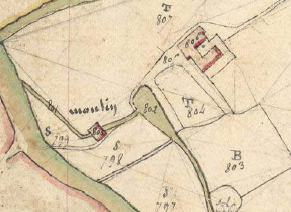 Ministrol, de Casafabre, en el Cadastre napoleònic del 1812 (Arxius Departamentals dels Pirineus Orientals)